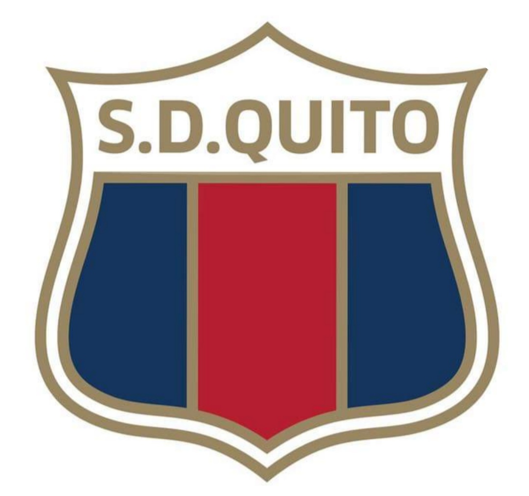 SELLO DE SOCIEDAD DEPORTIVO QUITO